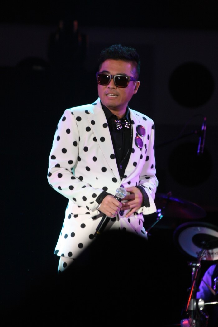 가수 김건모